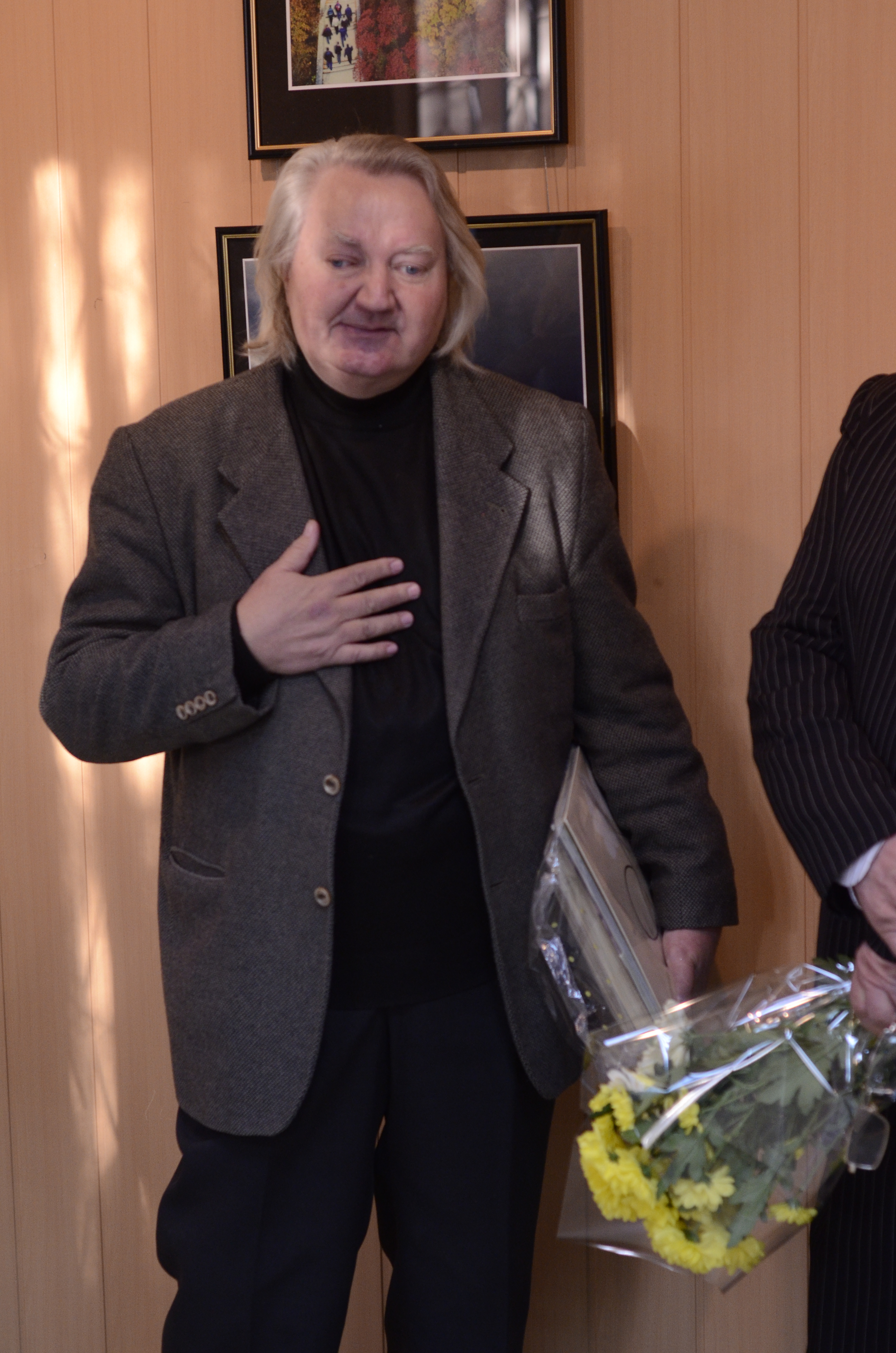 Открытие фотовыставки «Прильни к студёным родникам» Валерия Андреевича Пащенко, члена НСФХУ.